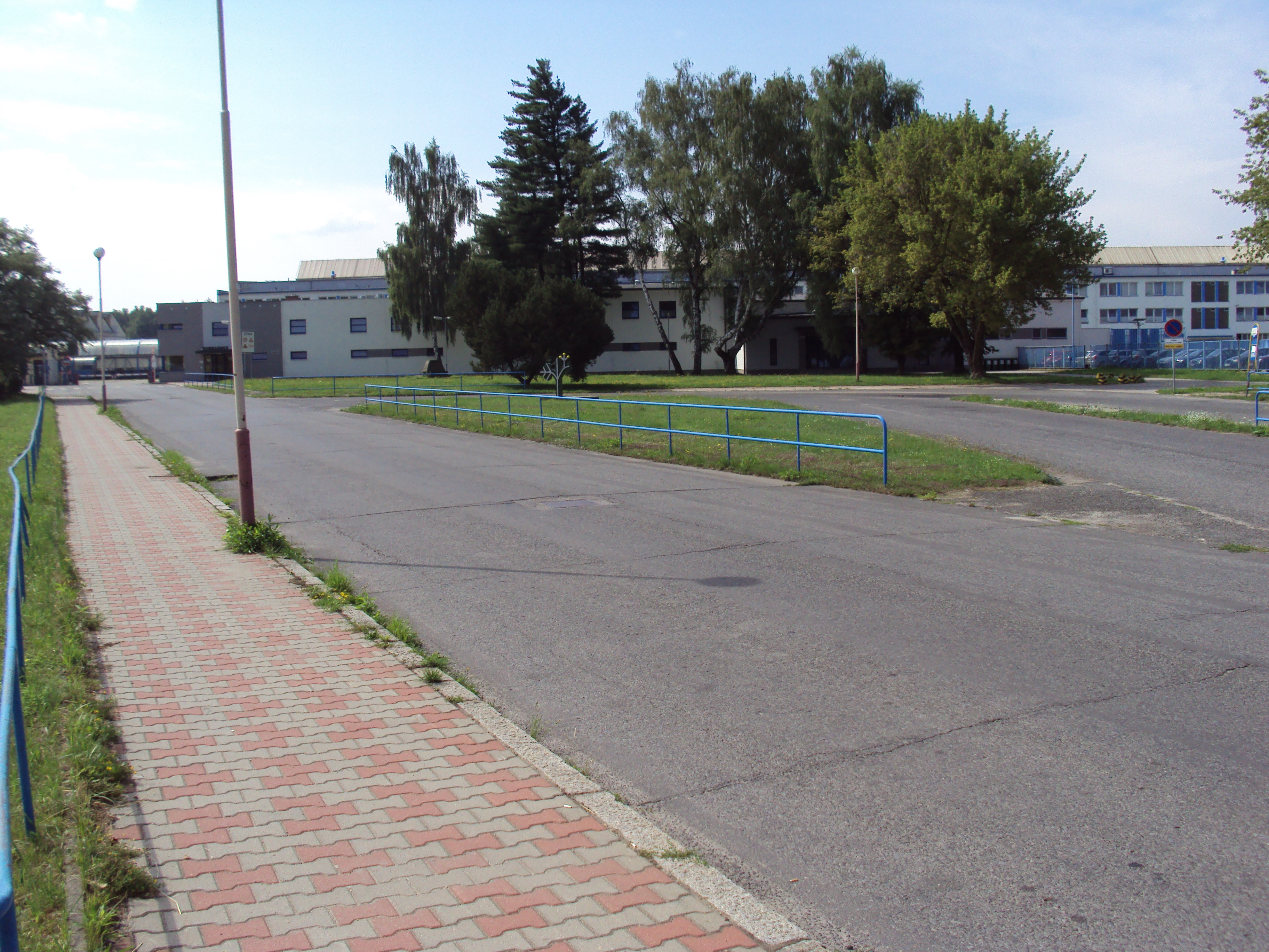 Firma Bombardier, závod v Dubici, Česká Lípa